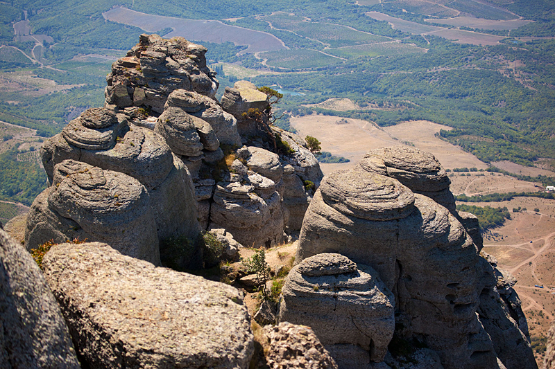 Южный пик горы Демерджи